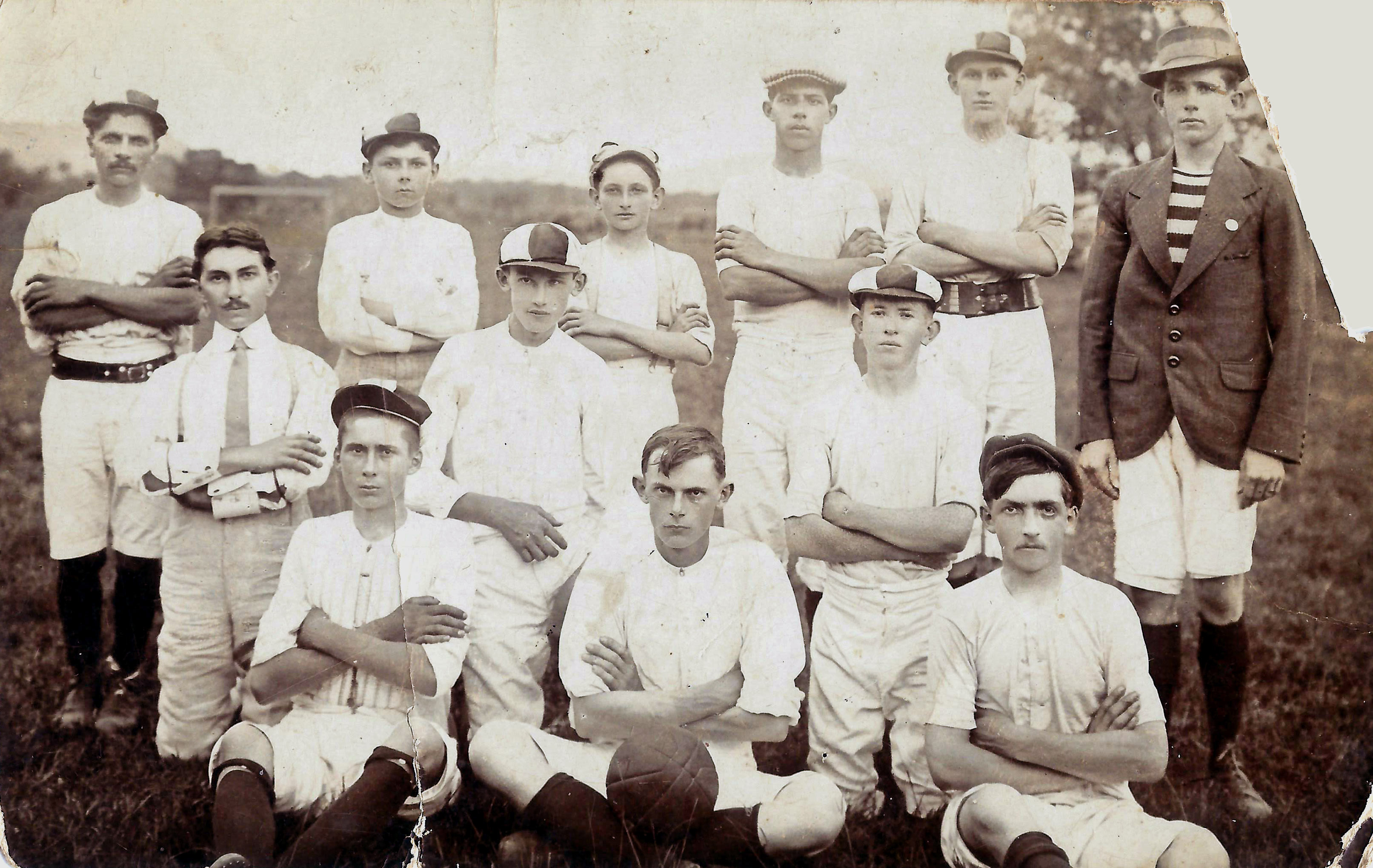 Futebol na colônia alemã de Arroio das Pedras, no interior de Santa Cruz do Sul. O segundo na filha de trás, a partir da esquerda, é o menino Antônio Frantz.